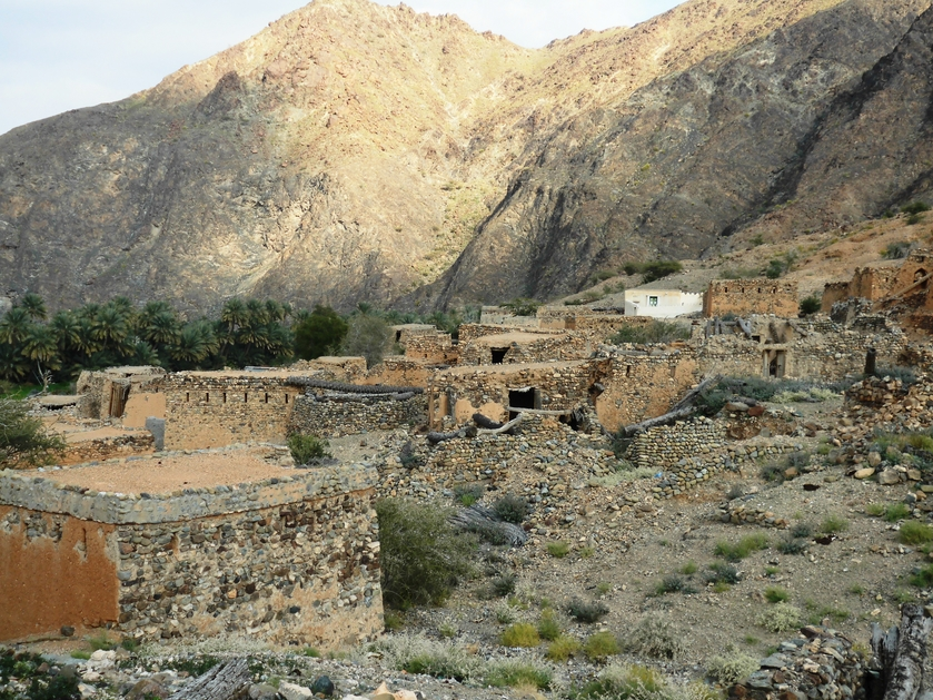 حارة بلدة الوقبة بشمال ولاية ينقل سلطنة عمان